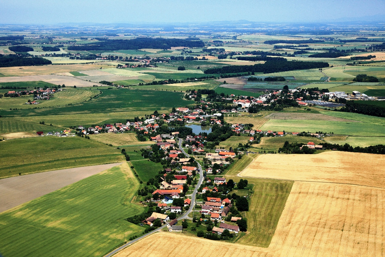 Letecký snímek obce Bolehošť z roku 2010.